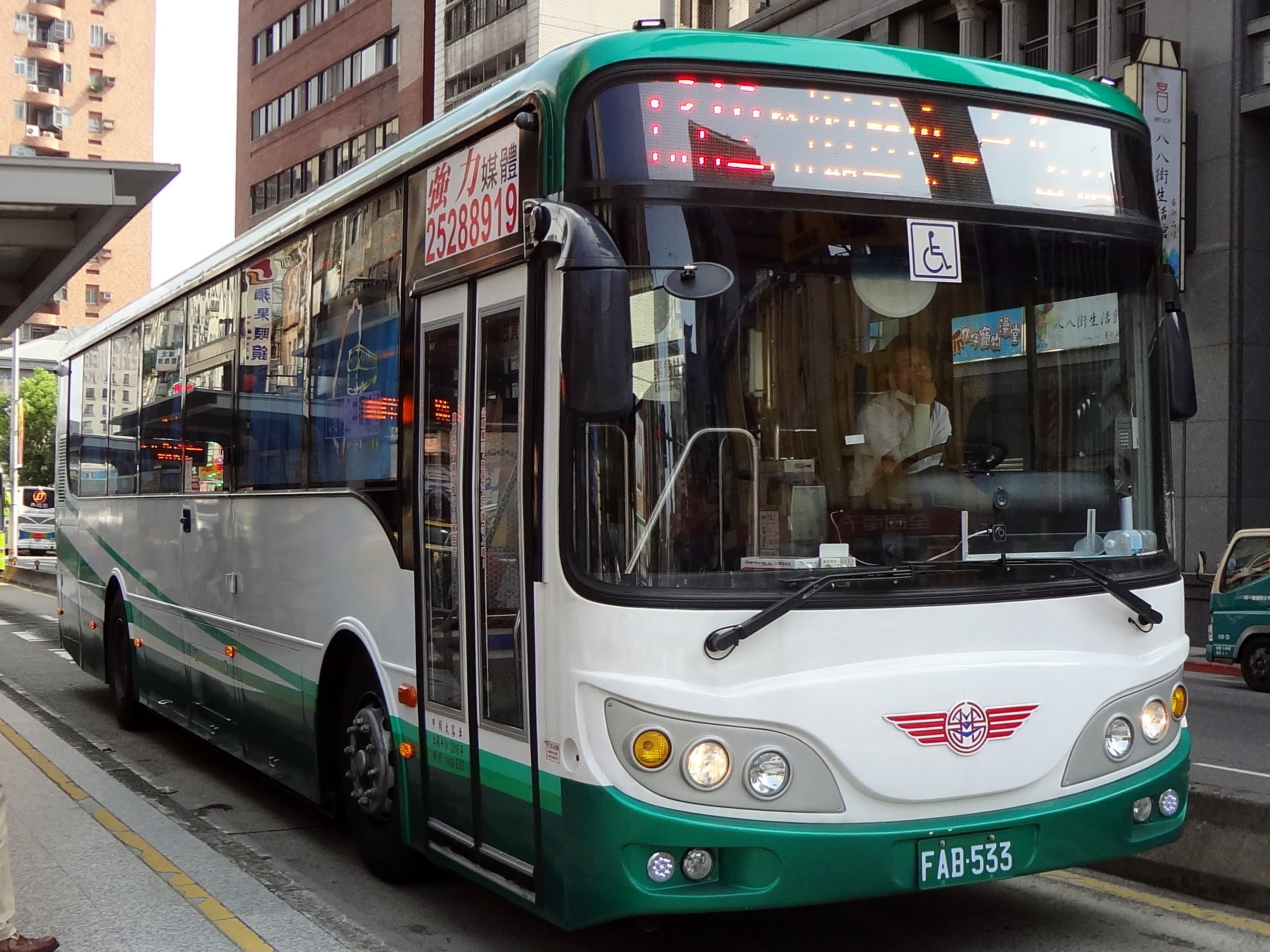 三重客運2016年日野RK8JRVA-KJF大客車FAB-533。